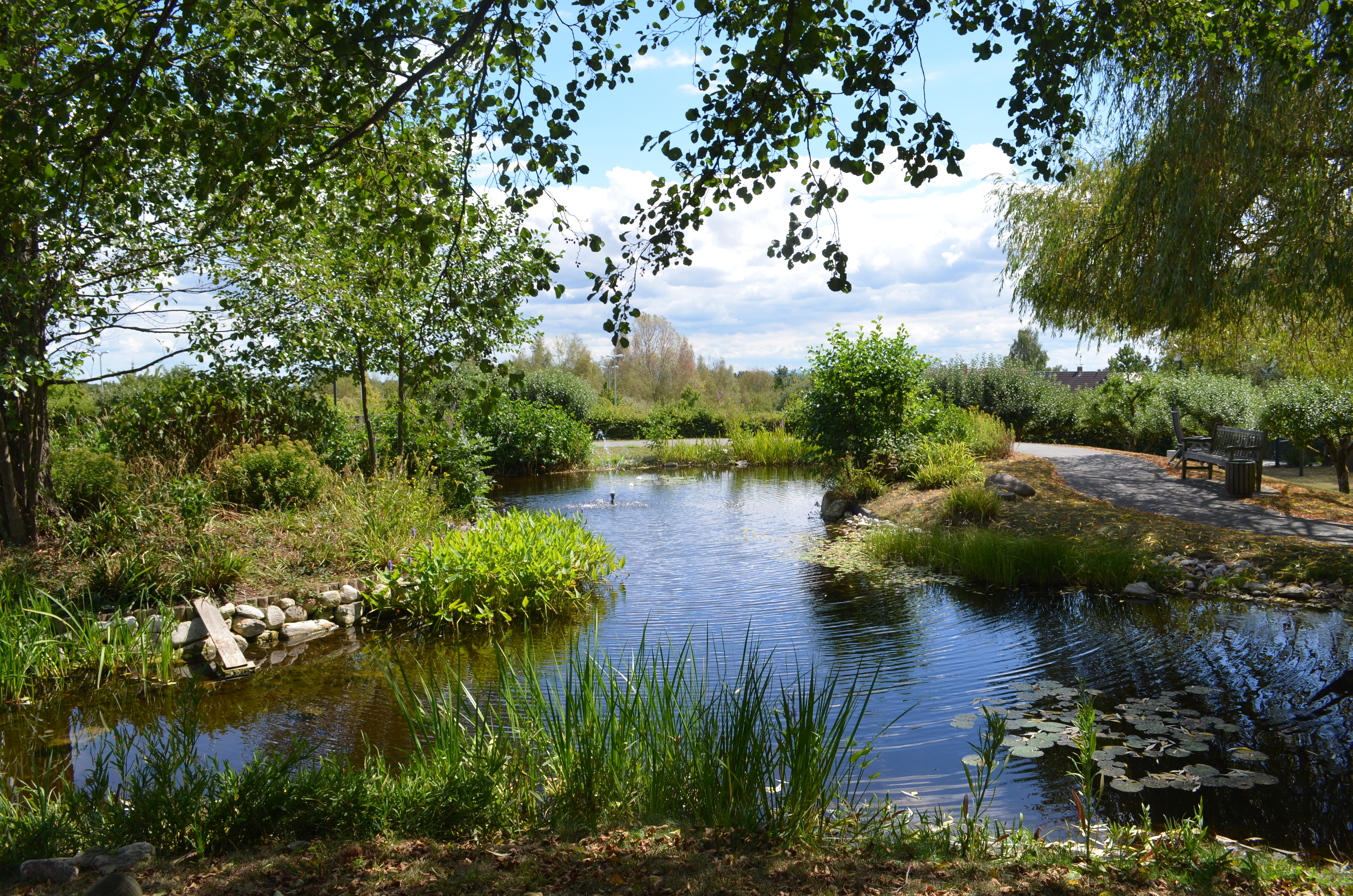 Altkönigstift, Park